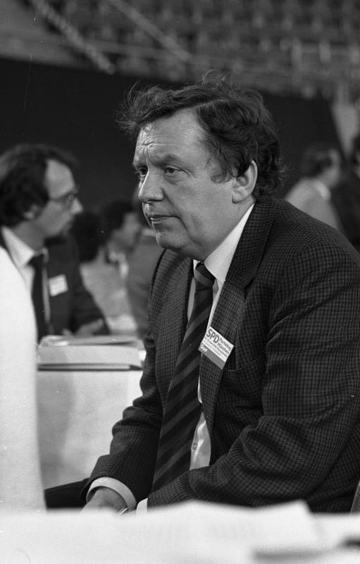 SPD-Parteitag in der Olympiahalle in München